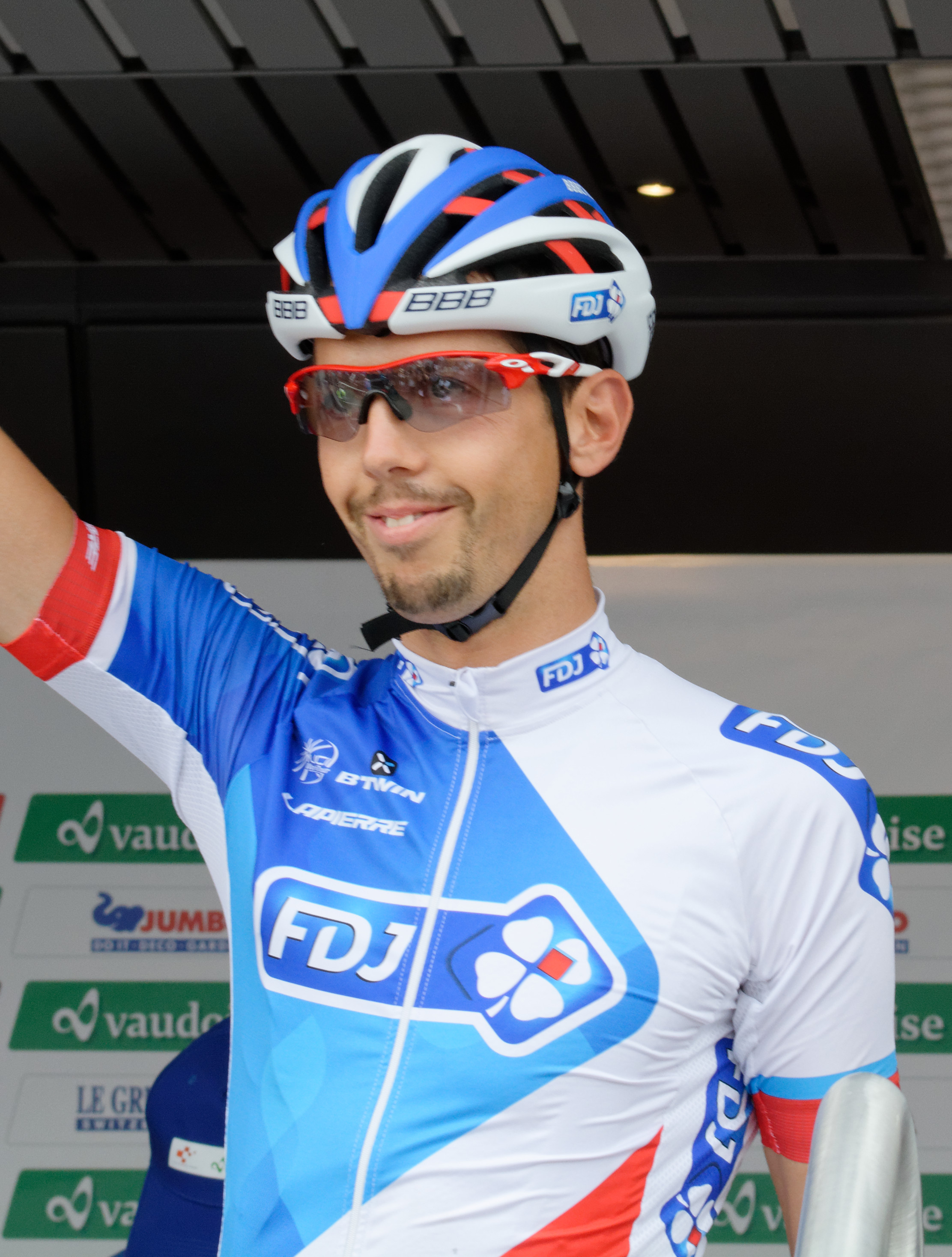 D71_9959_DxO